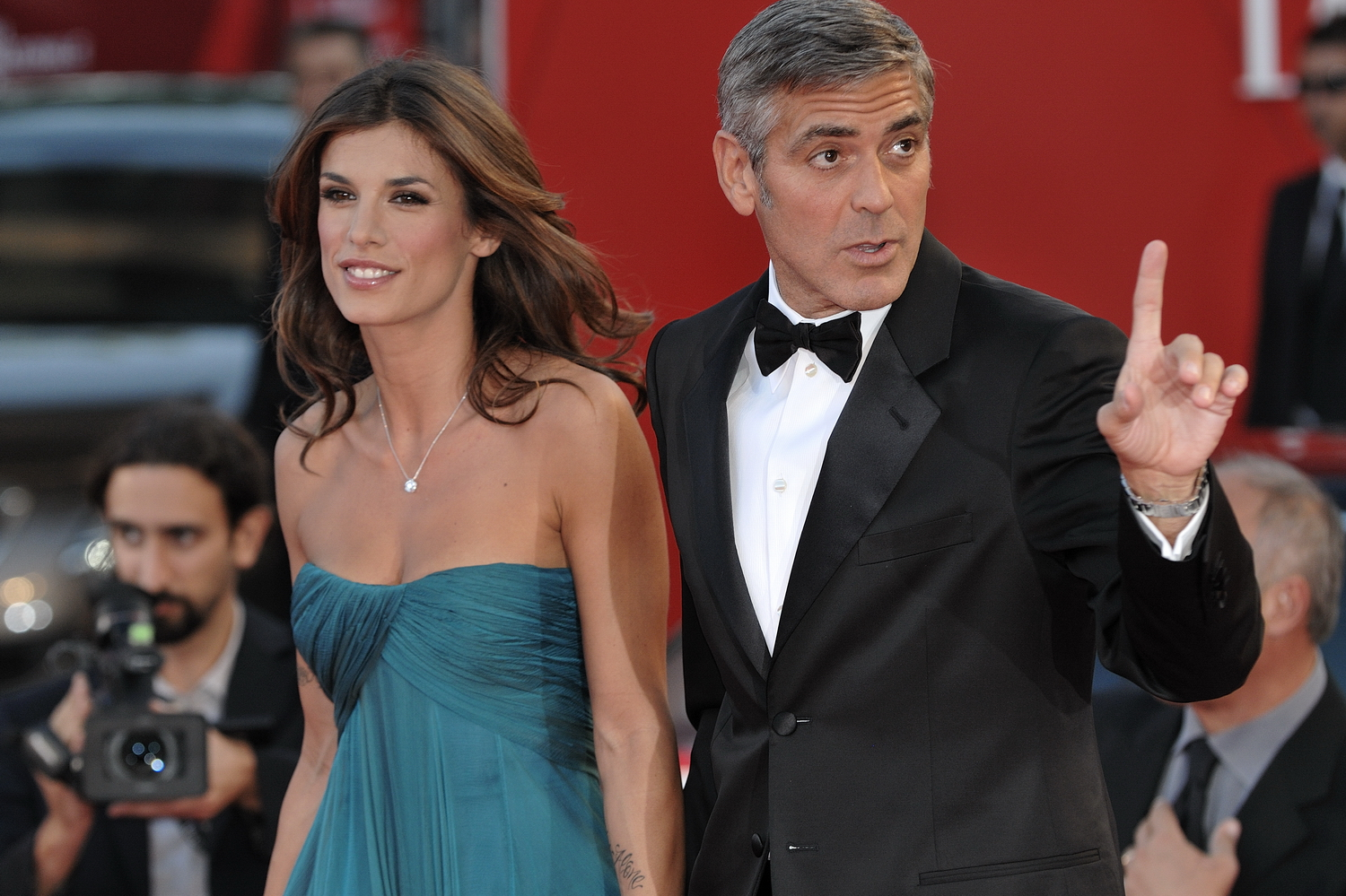 66ème Festival du Cinéma de Venise (Mostra), 6ème jour (07/09/2009) Tapis Rouge avec George Clooney et Elisabetta Canalis, Ewan McGregor et le réalisateur Grant Heslov pour le film : The men who stare at goats